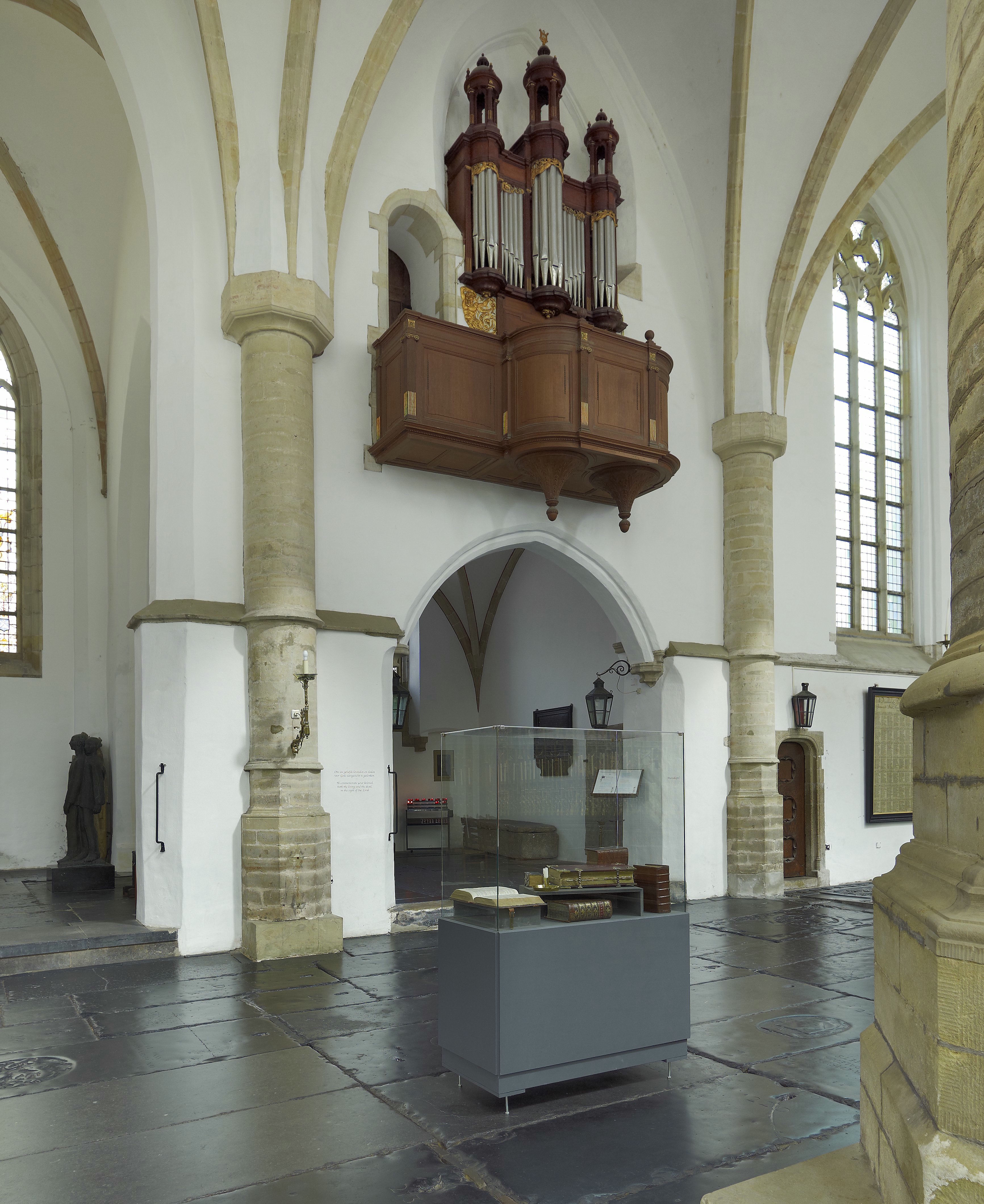 Grote of Sint Bavokerk: Interieur, kleine orgel boven ingang van zijkapel